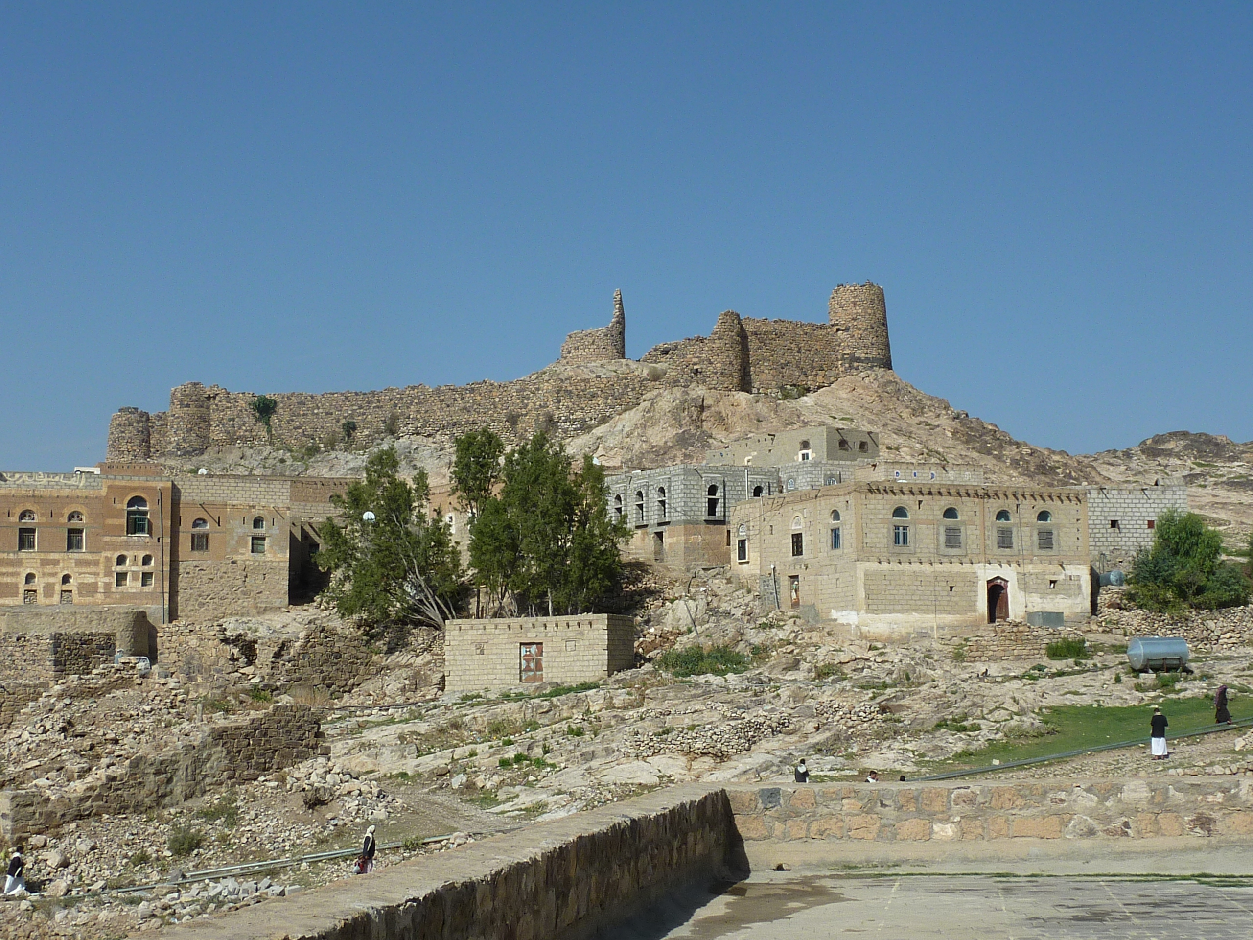 Yafaa, Dhamar, Yemen.